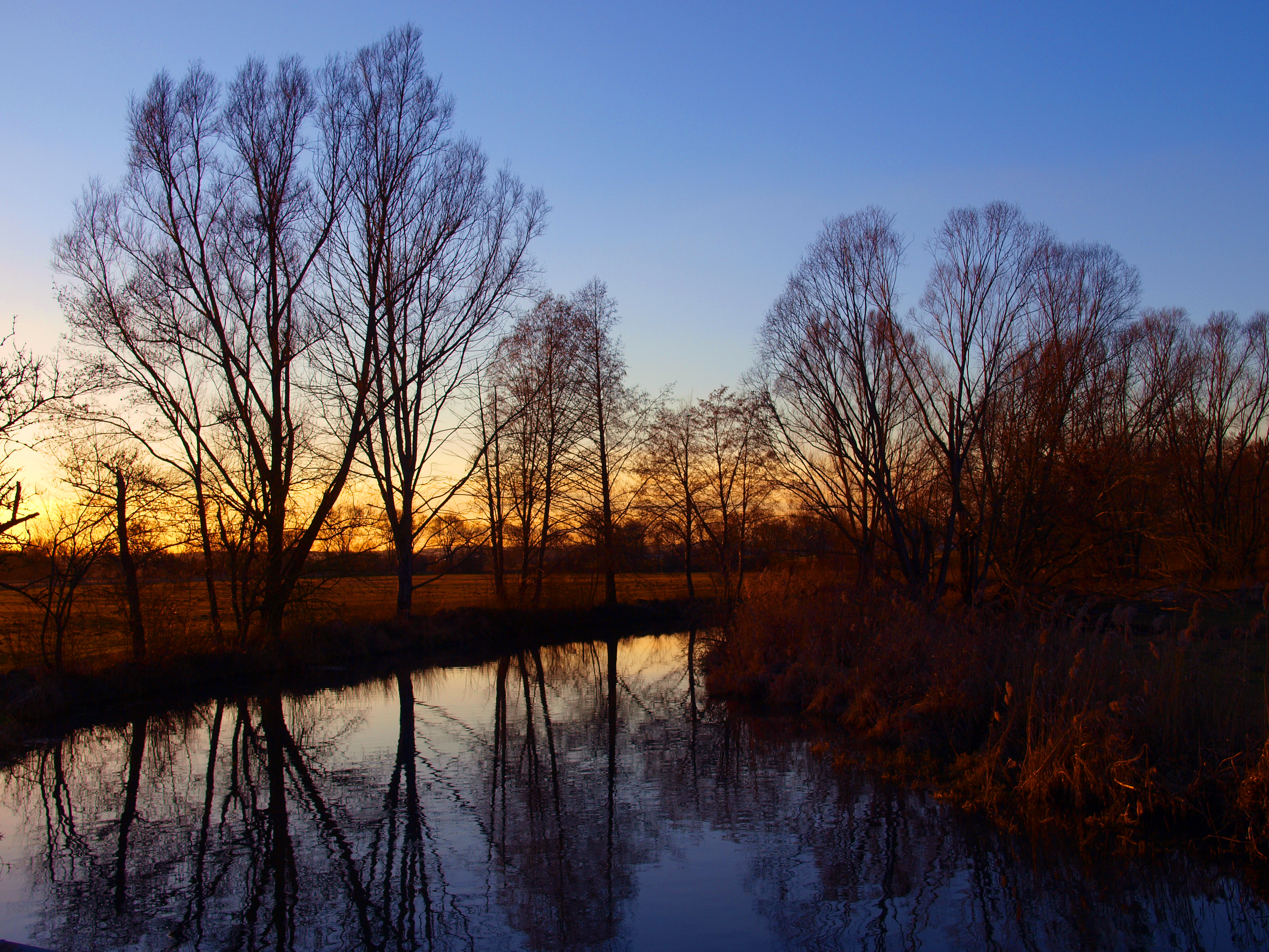 (NSG:BW-4.053)_Langenauer Ried